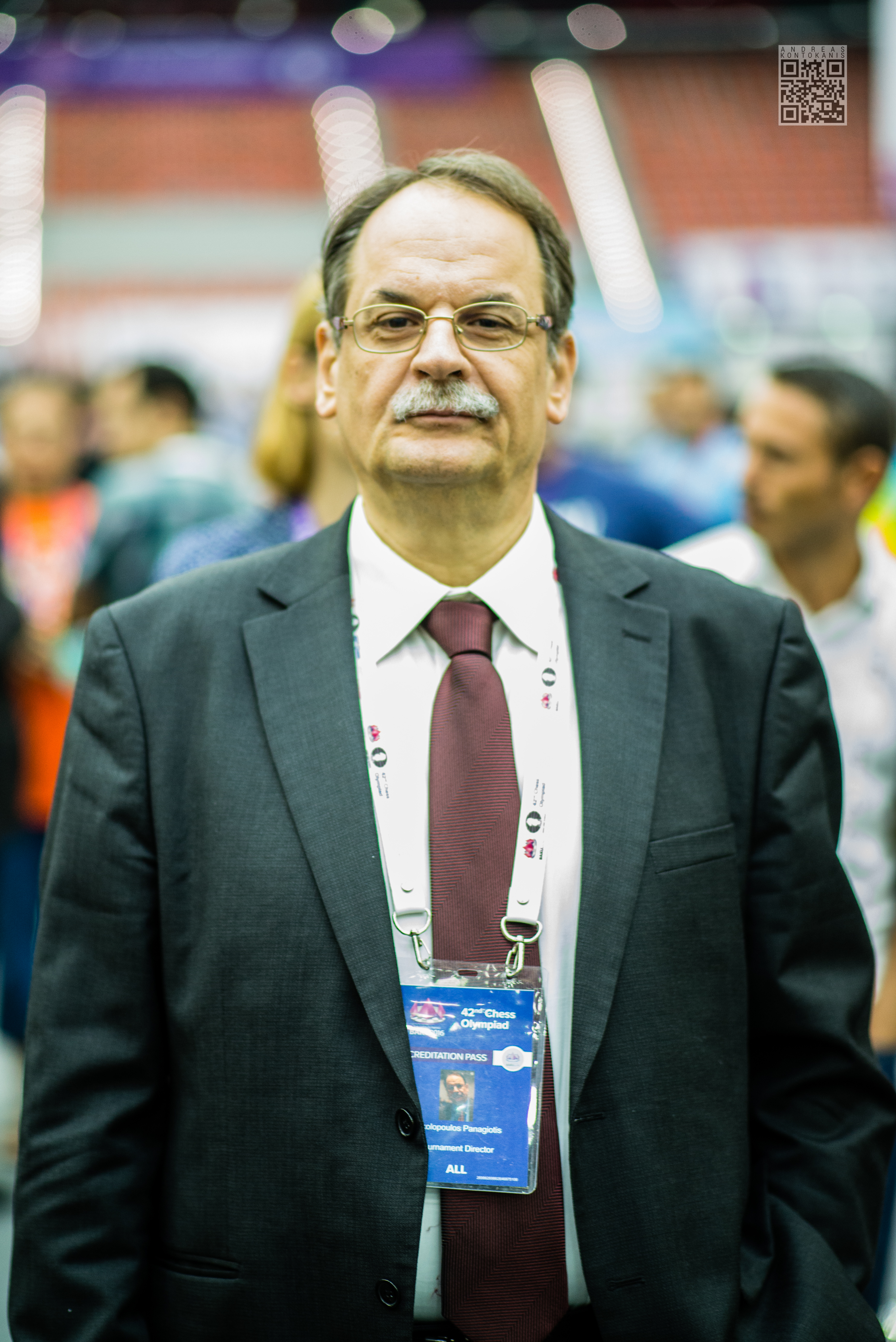 Takis Nikolopoulos